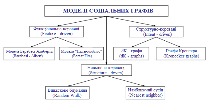 Модель социальных графов